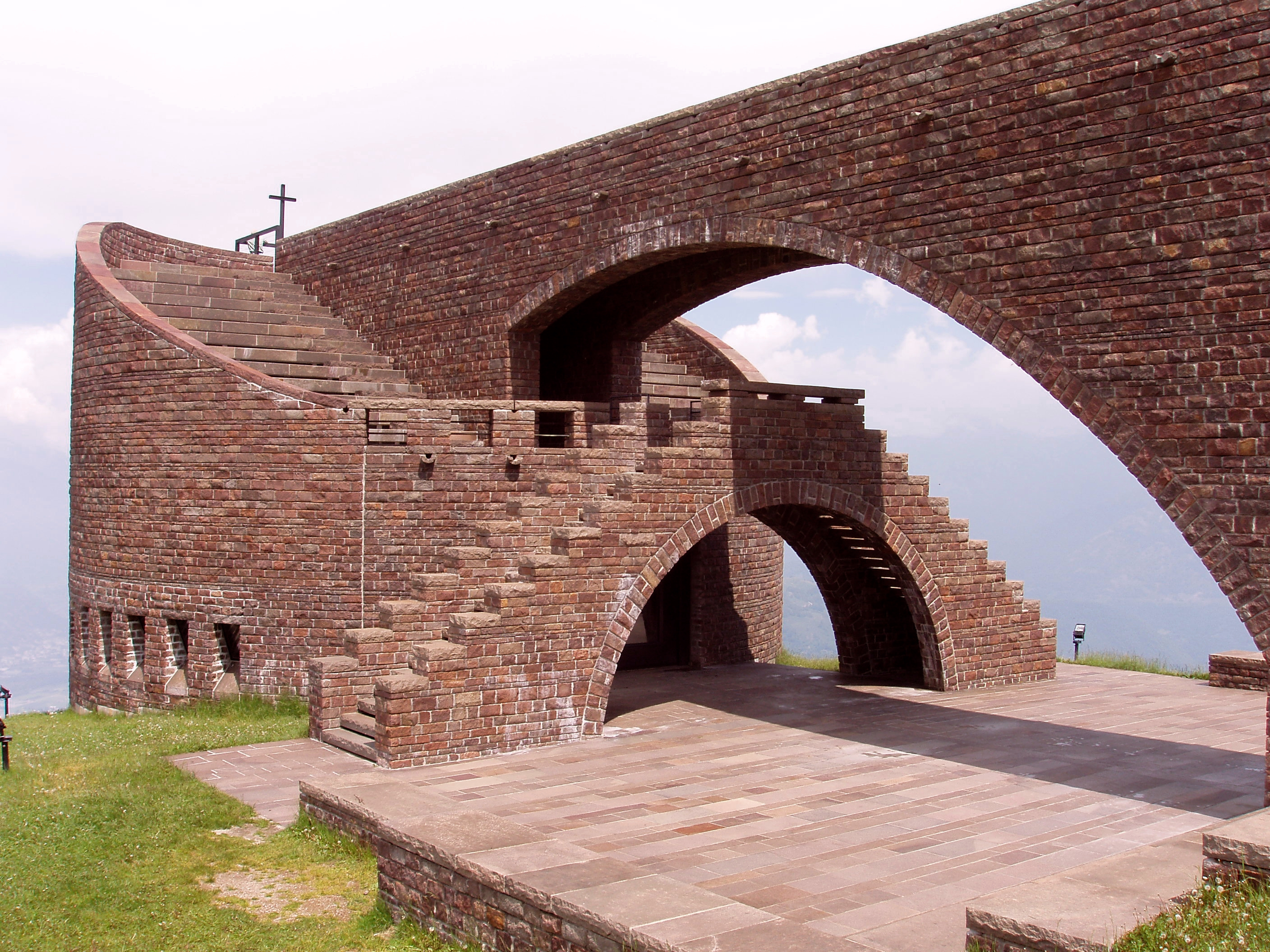 1990/96 Arch. Mario Botta